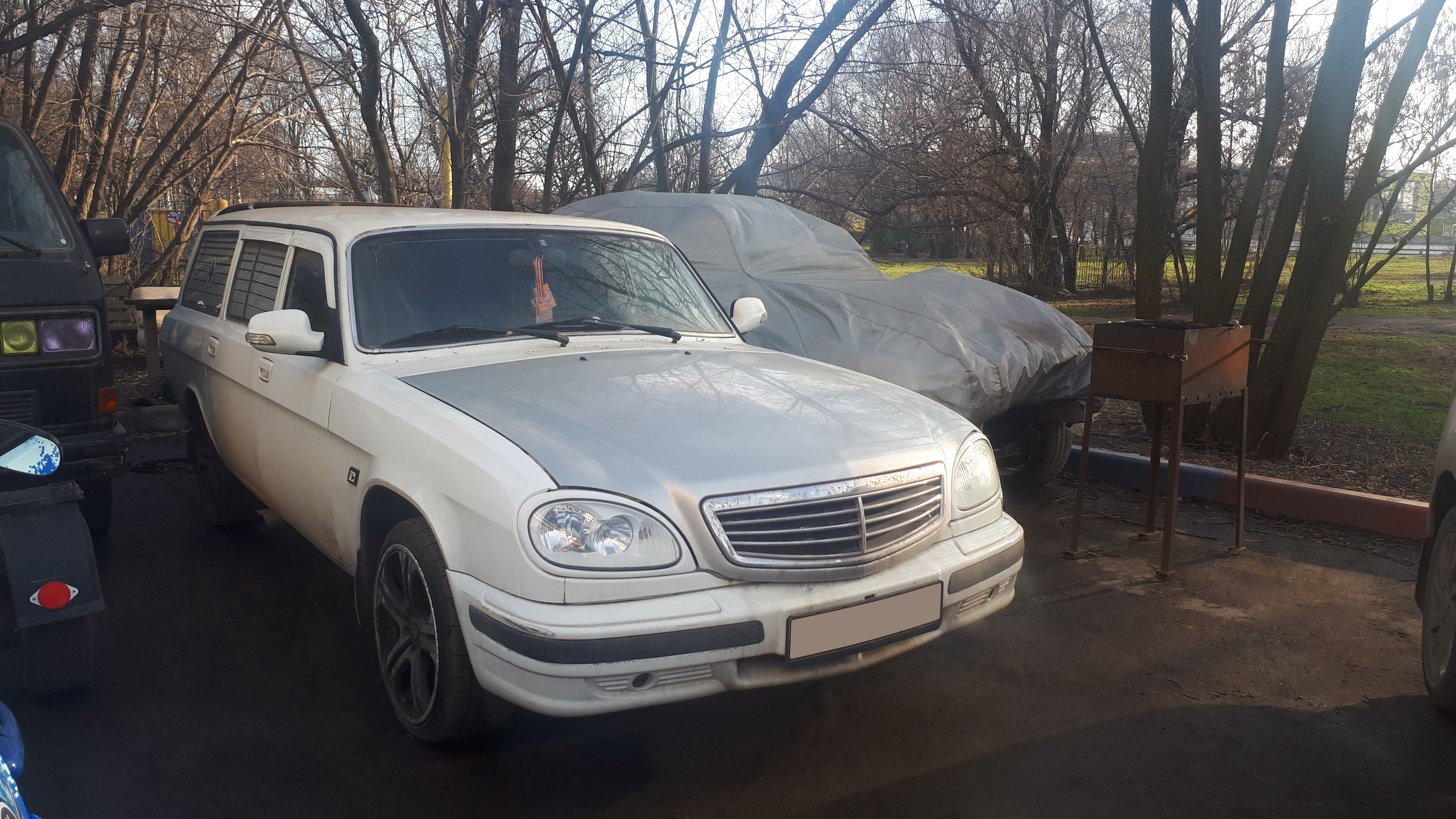 ГАЗ-311052.